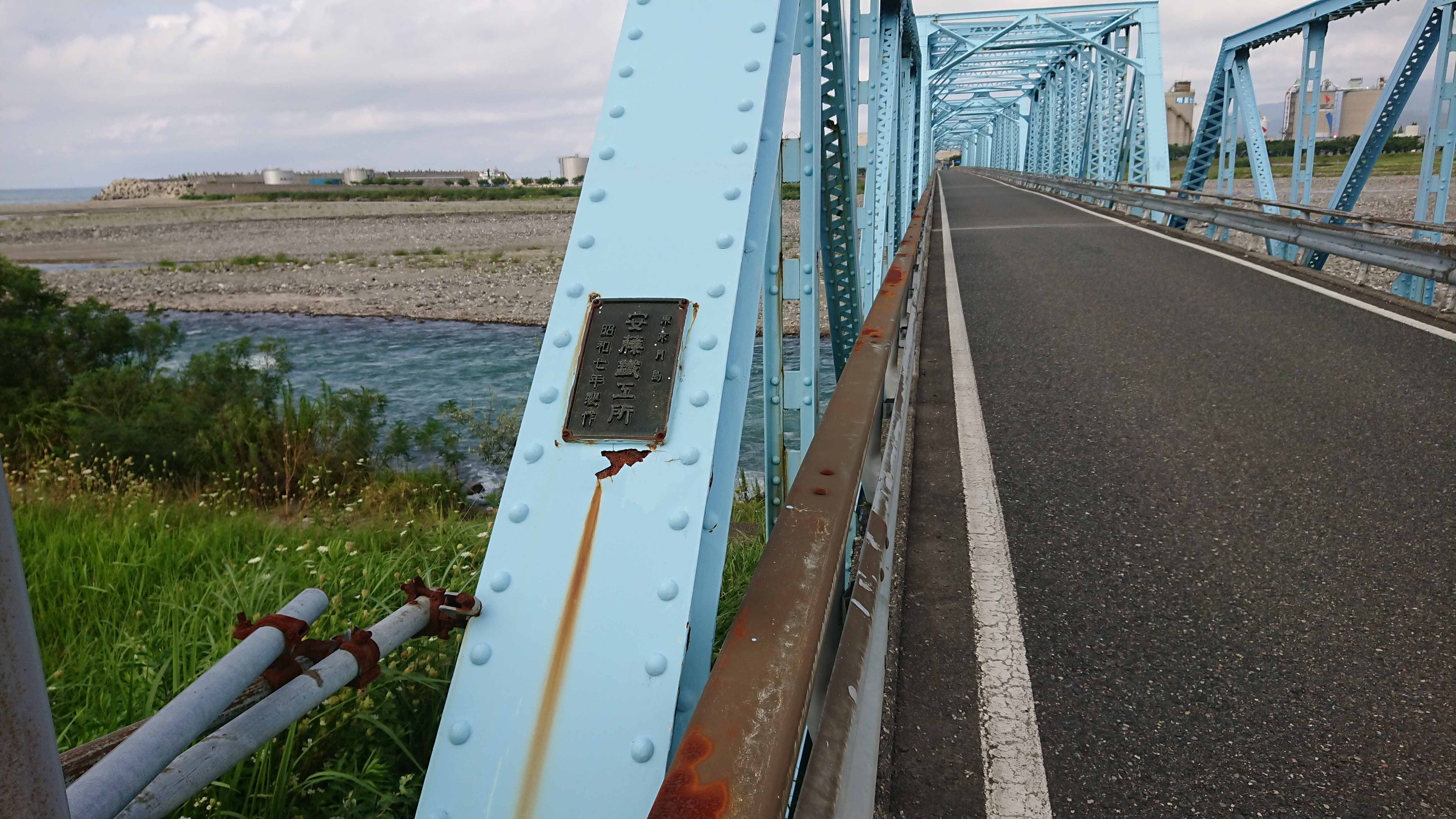 姫川橋を撮影。 新潟県糸魚川市、2020年8月16日。